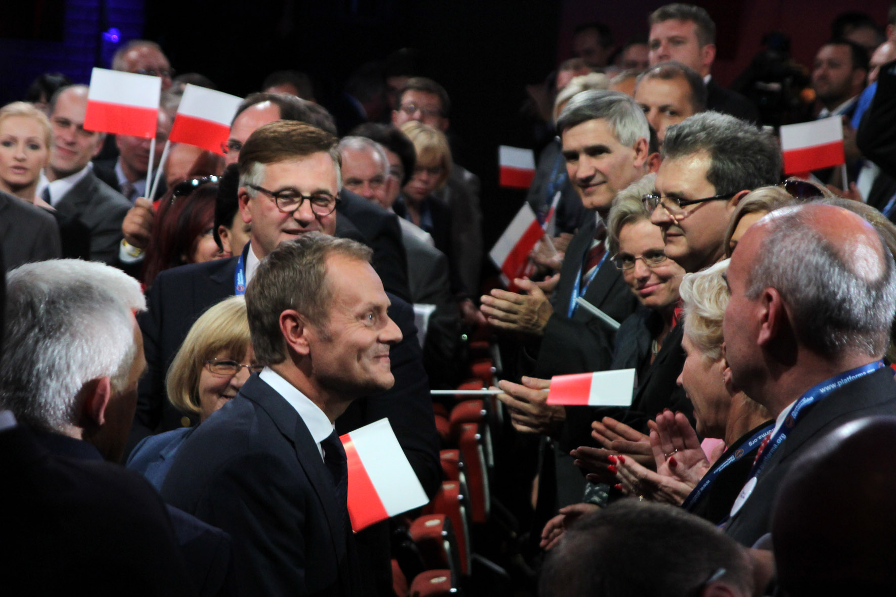 06.10.2011, w Chorzowie odbyła się ostatnia konwencja wyborcza w tej kampanii